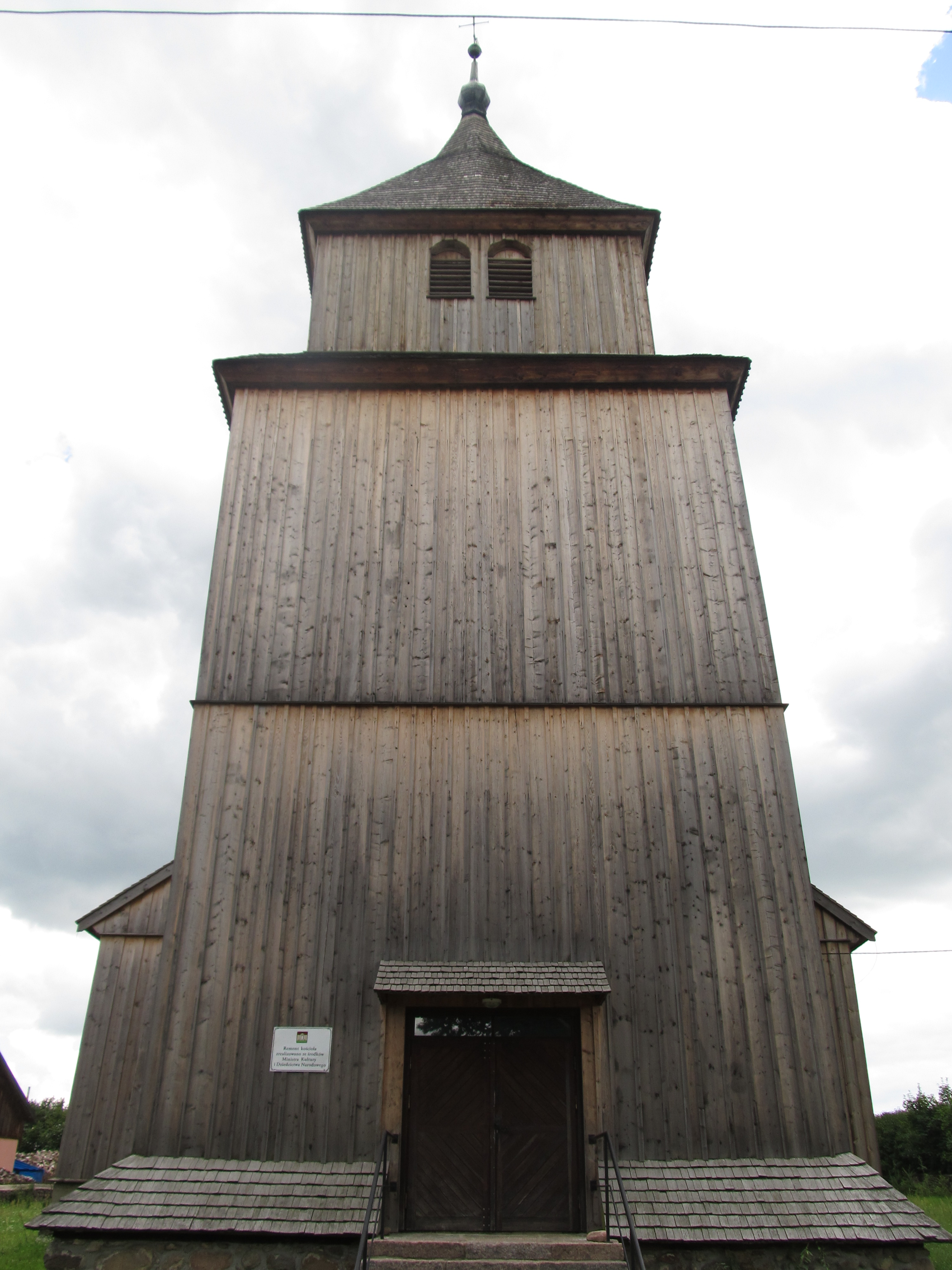 Ostrykół - dawny kościół ewangelicki (drewn. z 1667), obecnie rzymskokatolicki parafialny pw. Podwyższenia Krzyża Świętego (zabytek nr A-585 z dn. 29.12.1964)